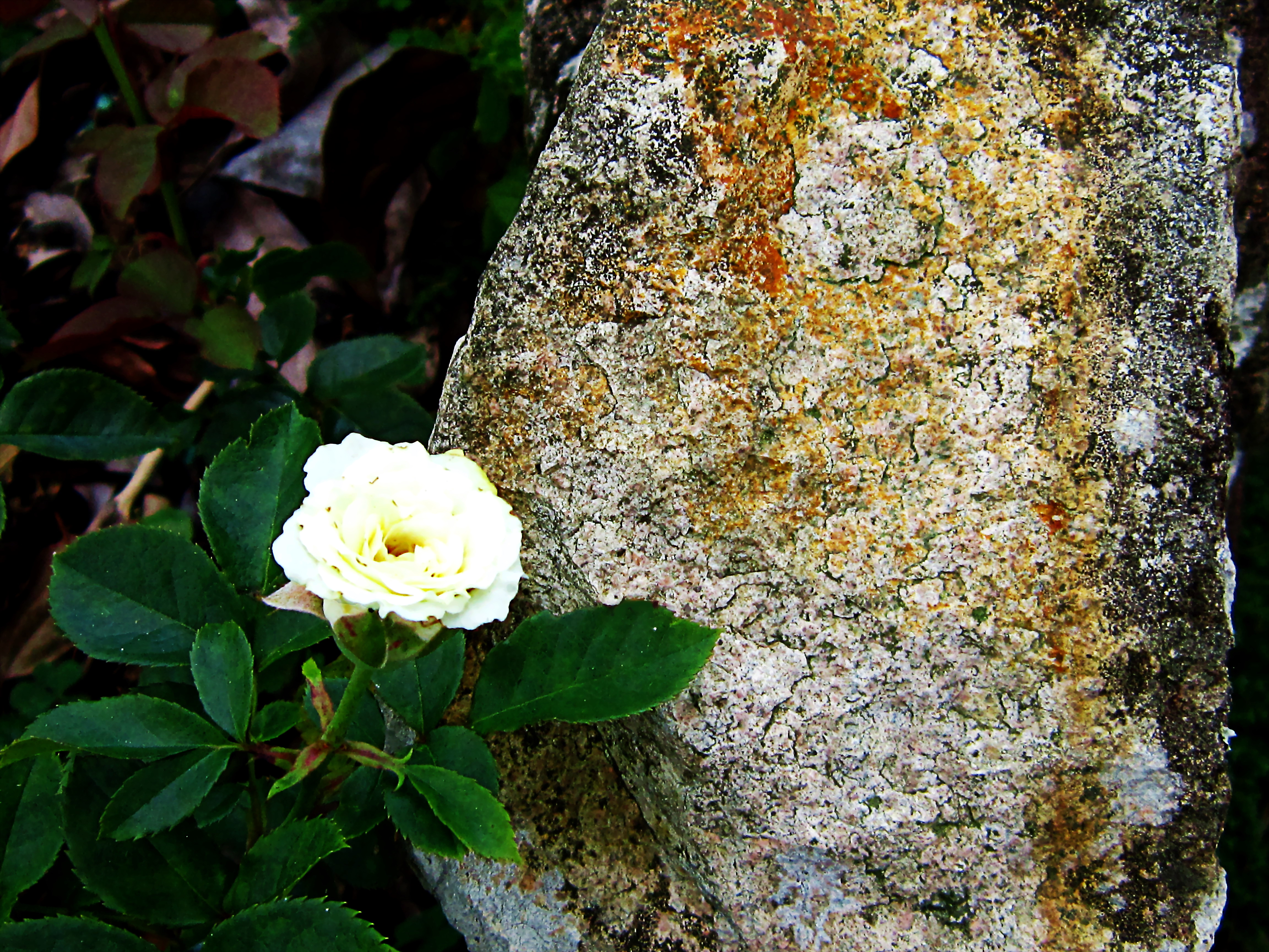 Hoa hồng trắng